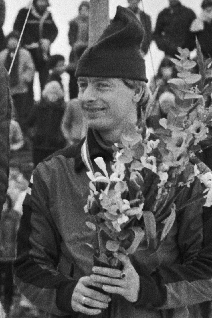 Amund Sjøbrend